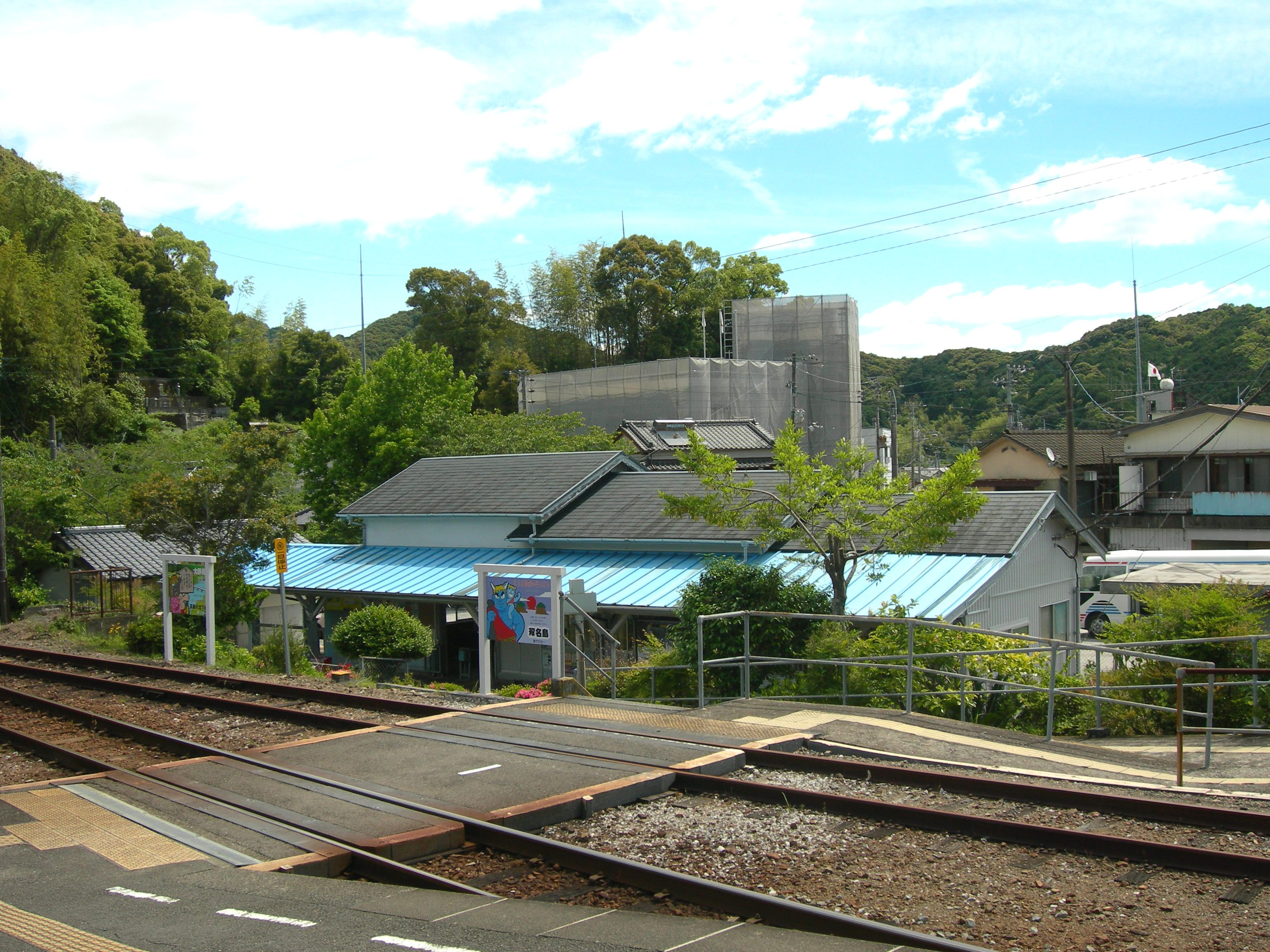 土佐久礼駅・駅舎ホーム側